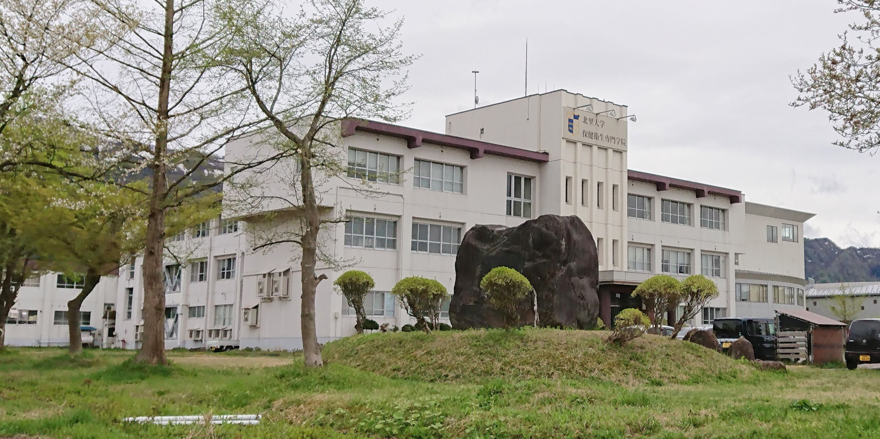 北里大学保健衛生学院の校舎